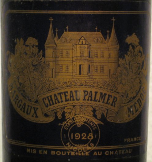 Château Palmer 1928 label